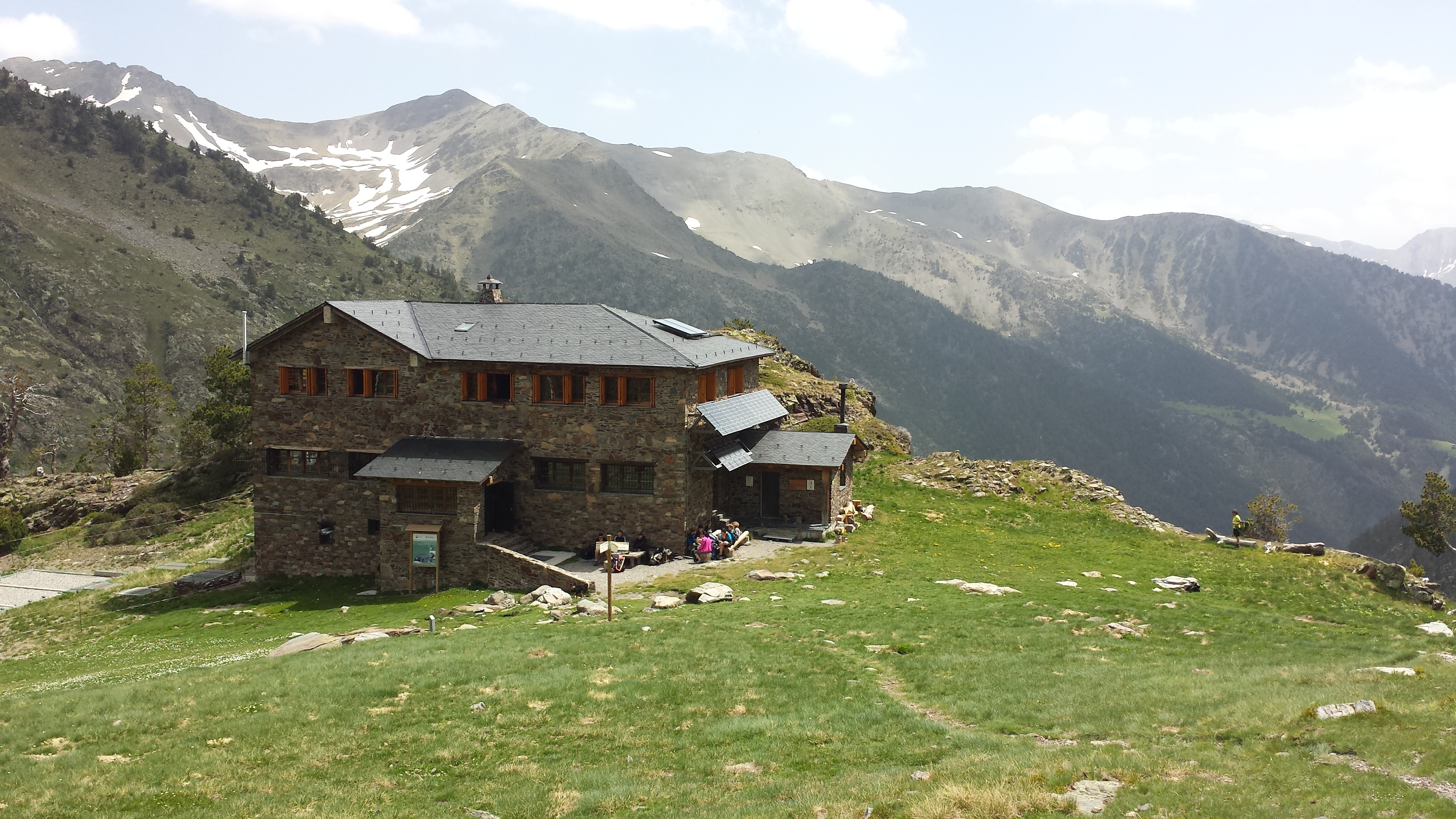 Valls del Comapedrosa (la Massana) This is a a photo of a natural area in Andorra with id: AD-PNCVC